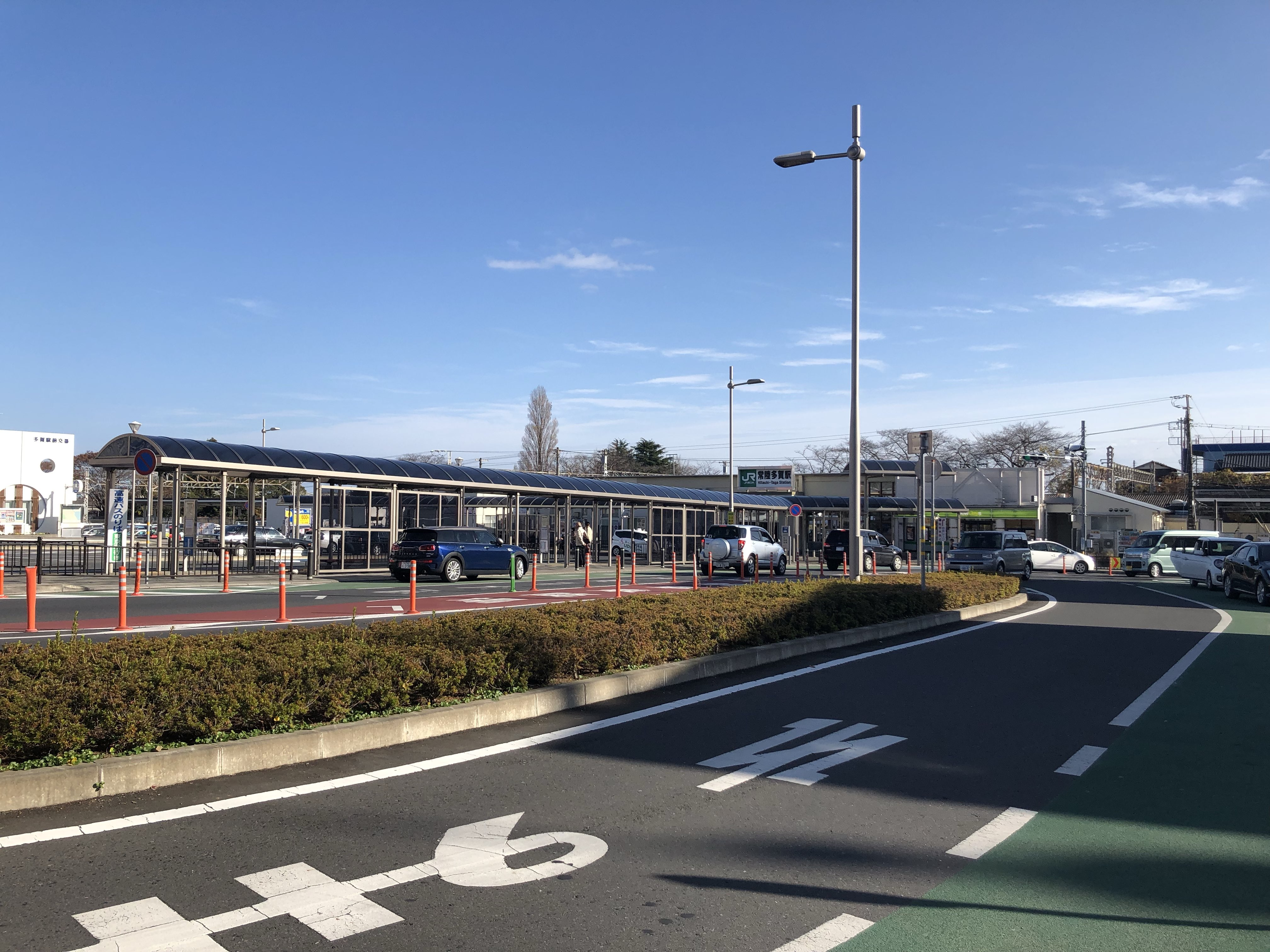 2018/12/06の常陸多賀駅の様子